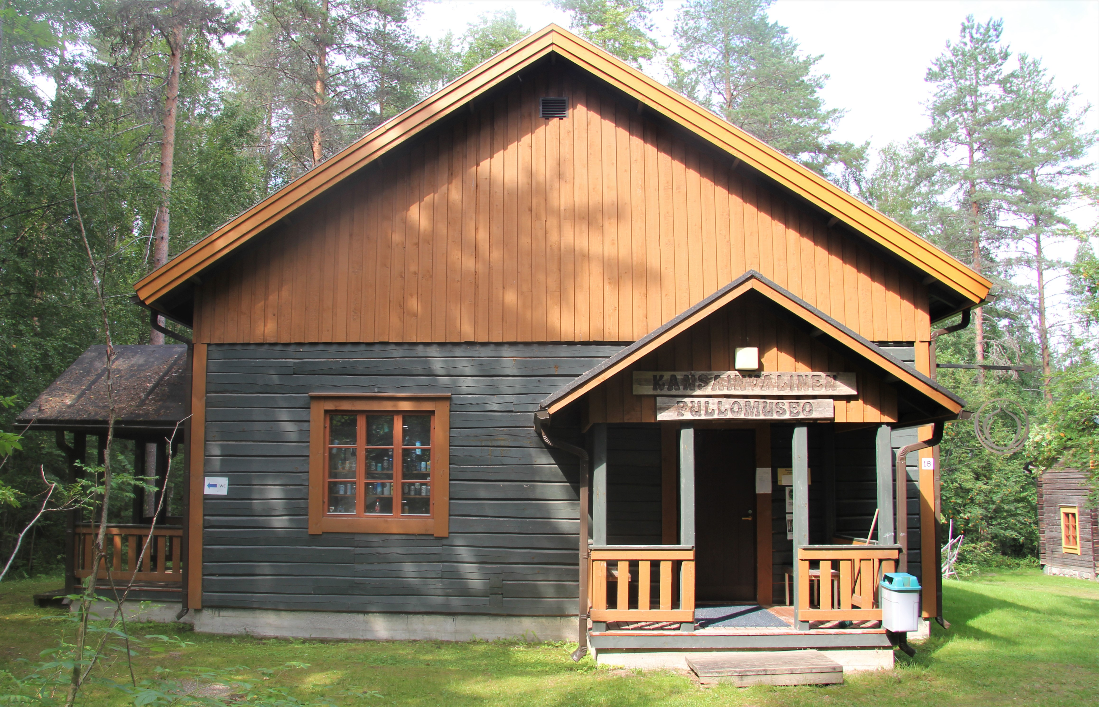 Kansainvälinen pullomuseon rakennus sijaitsee Sonkajärven kotiseutumuseon pihapiirissä, Sonkajärven kirkonkylällä.